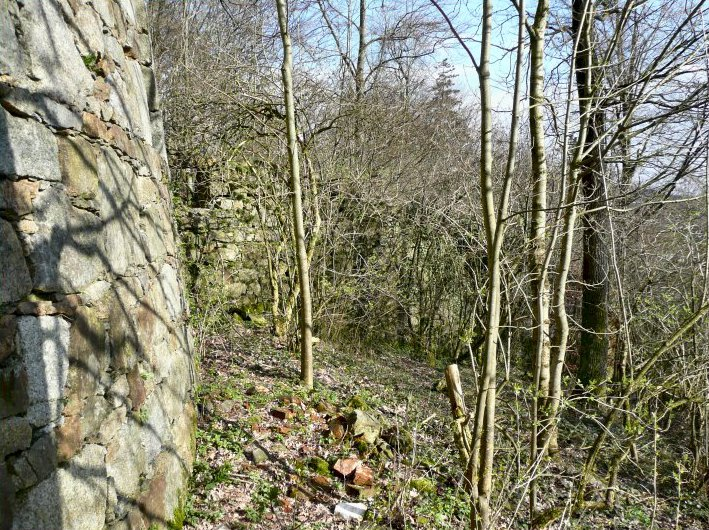 Warte Edelburga mit Anschlussmauer